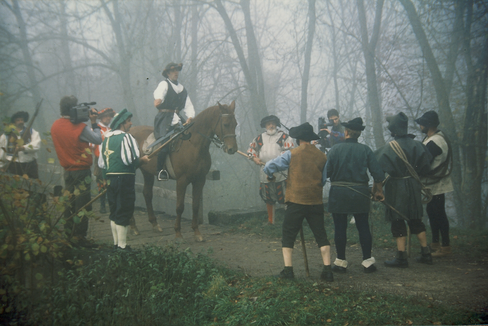 Dreharbeiten Team TV Eichberg vor der Küssaburg im Landkreis Waldshut-Tiengen, Landschaft Klettgau, in der Gemeinde Küssaberg am Hochrhein. Szenerie: Aufständische im Bauernkrieg verhandeln mit einem Landvogt.